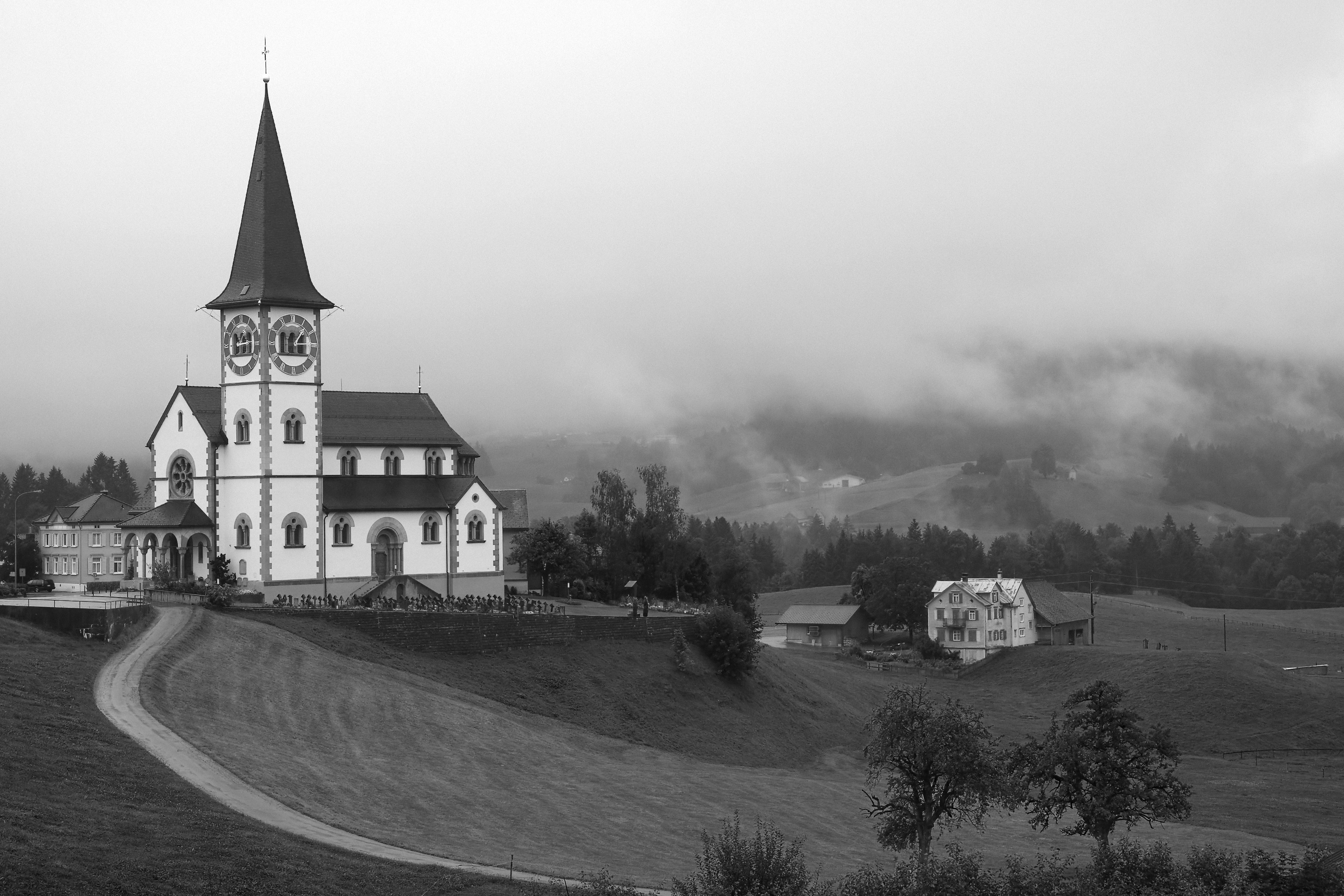 Die Wallfahrtskirche Maria Hilf in Haslen, erbaut 1901, Architekt: August Hardegger